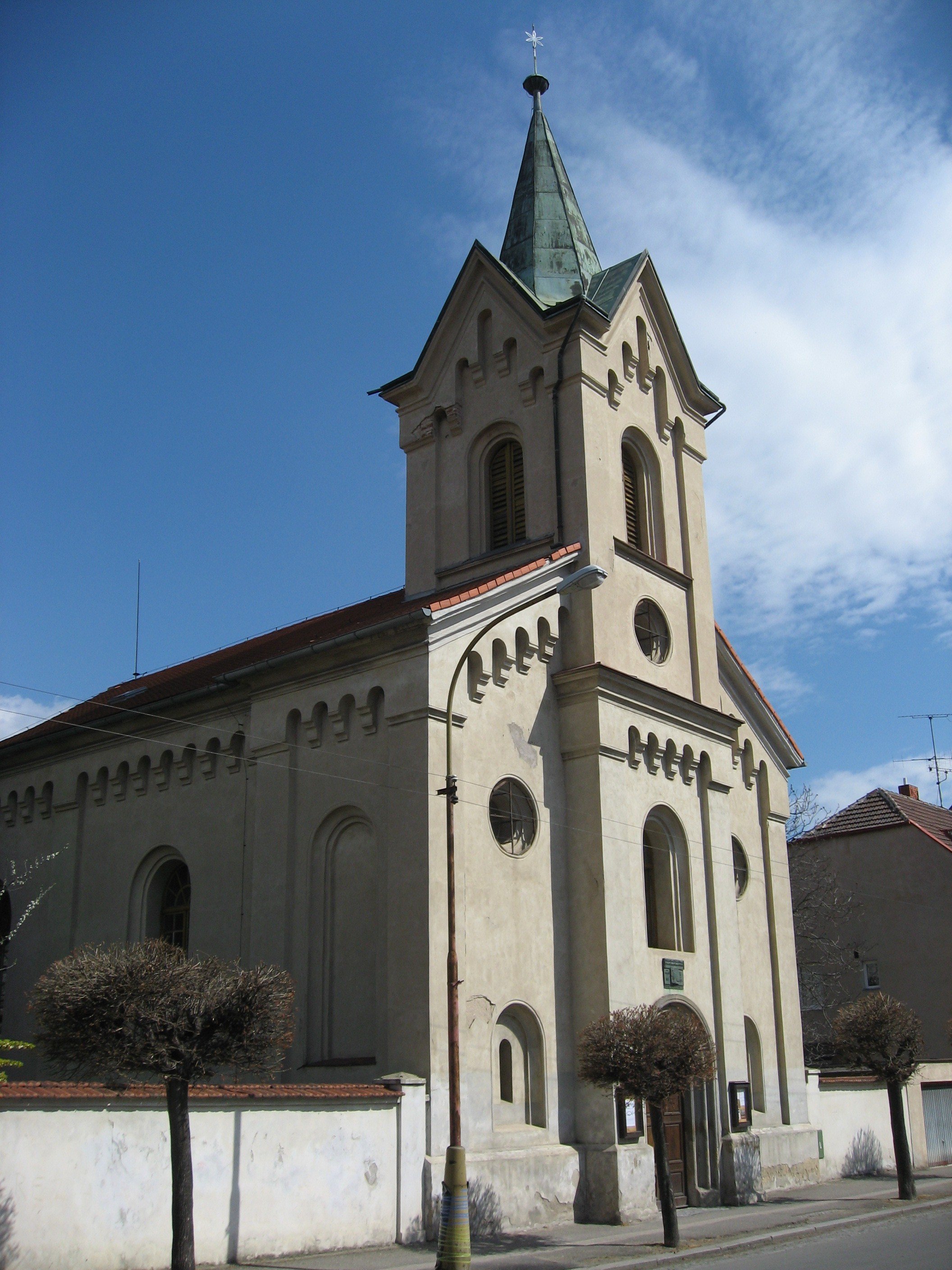 Libčice nad Vltavou, evangelický kostel